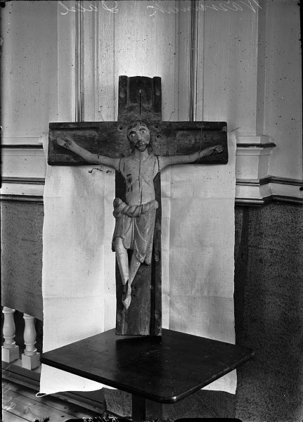 Krucifix av snidad ek och målat. 13- eller 1400-talet. Snabbinv. Kategori: (05) KrucifixKrucifix av snidad ek och målat. 13- eller 1400-talet. Snabbinv.